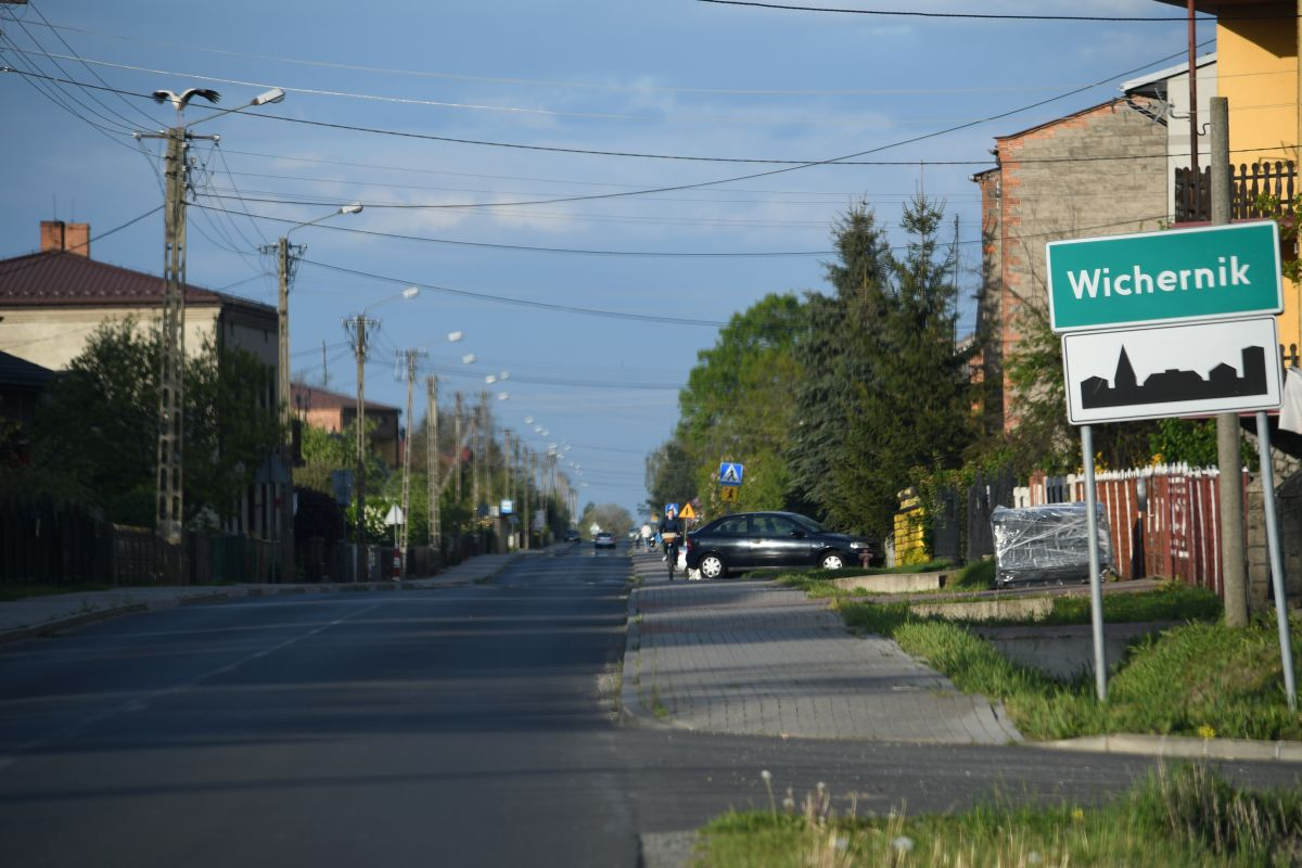 Wichernik 2019